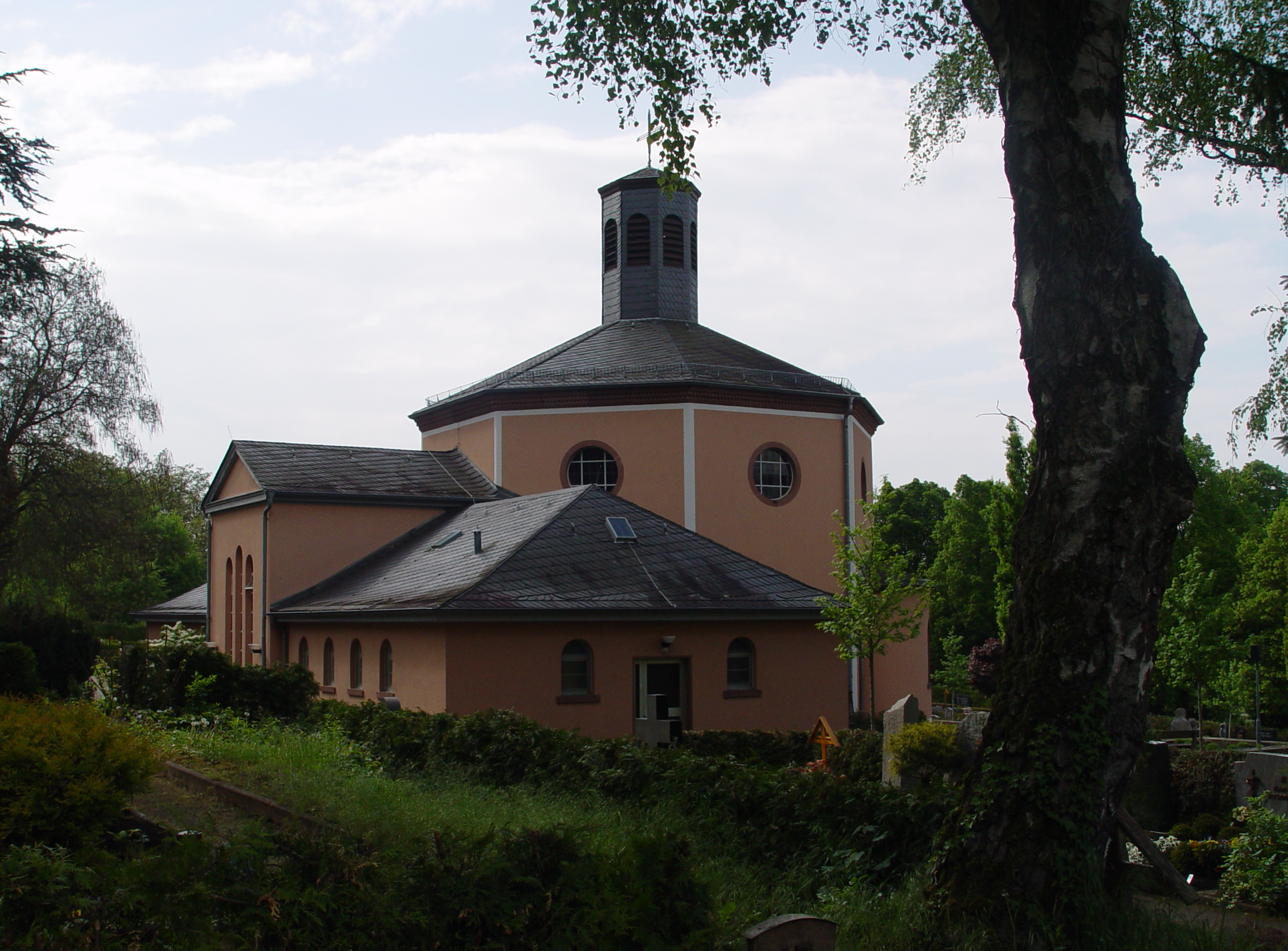 Kapelle Friedhof Grötzingen.